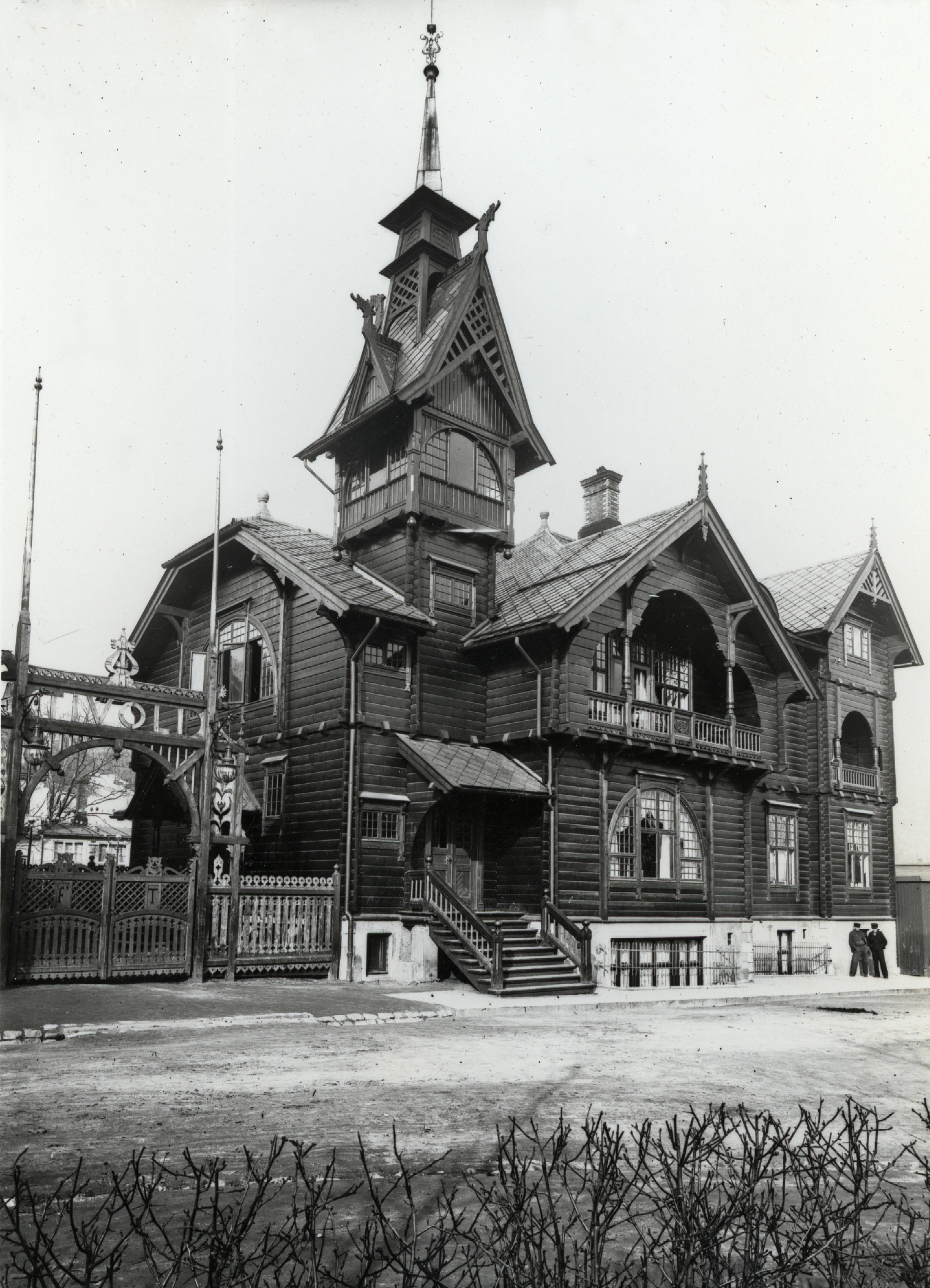 Format: Fotopositiv Dato / Date: etter 1900 Fotograf / Photographer: Erik Olsen Sted / Place: Ilevollen 15, Trondheim Wikipedia: Hjorten Revy- og Varietéteater Wikipedia: Hans Lemvig Christiansen (1826 - 1879) Eier / Owner Institution: Trondheim byarkiv, The Municipal Archives of Trondheim Arkivreferanse / Archive reference: Tor.H45.P1.F9568 Merknad: Hjorten fikk navnet sitt i 1867, og var et kjent forlystelsessted. Fritz Topp kjøpte eiendommen i 1898, og da ble spesialbygniningen ombygd til den karakteristiske dragestilen som eldre trondhjemmere husker. Huset ble revet i 1962 for å gi plass til Ilevollen menighetshus og sykehjem.